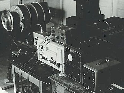 Erster experimenteller Aufbau eines Kernresonanzspektrometers an der Universität Jena